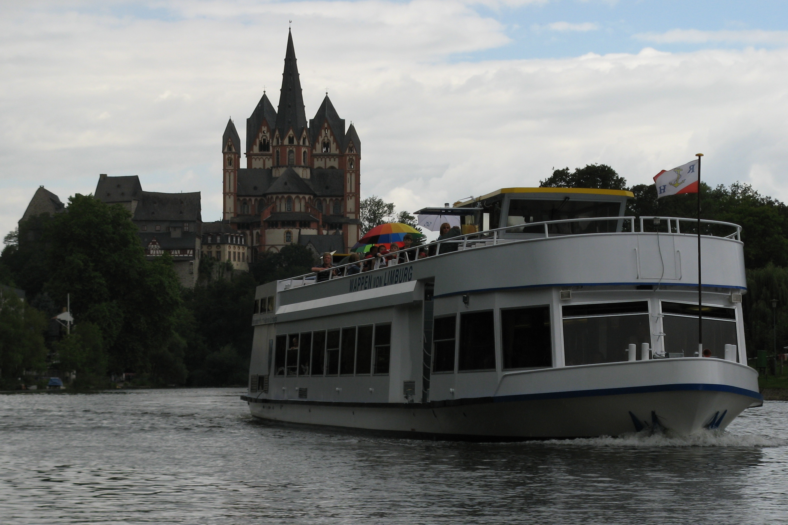 Ostseite des Limburger Dom, mit dem Schiff Wappen von Limburg von der Lahn aus